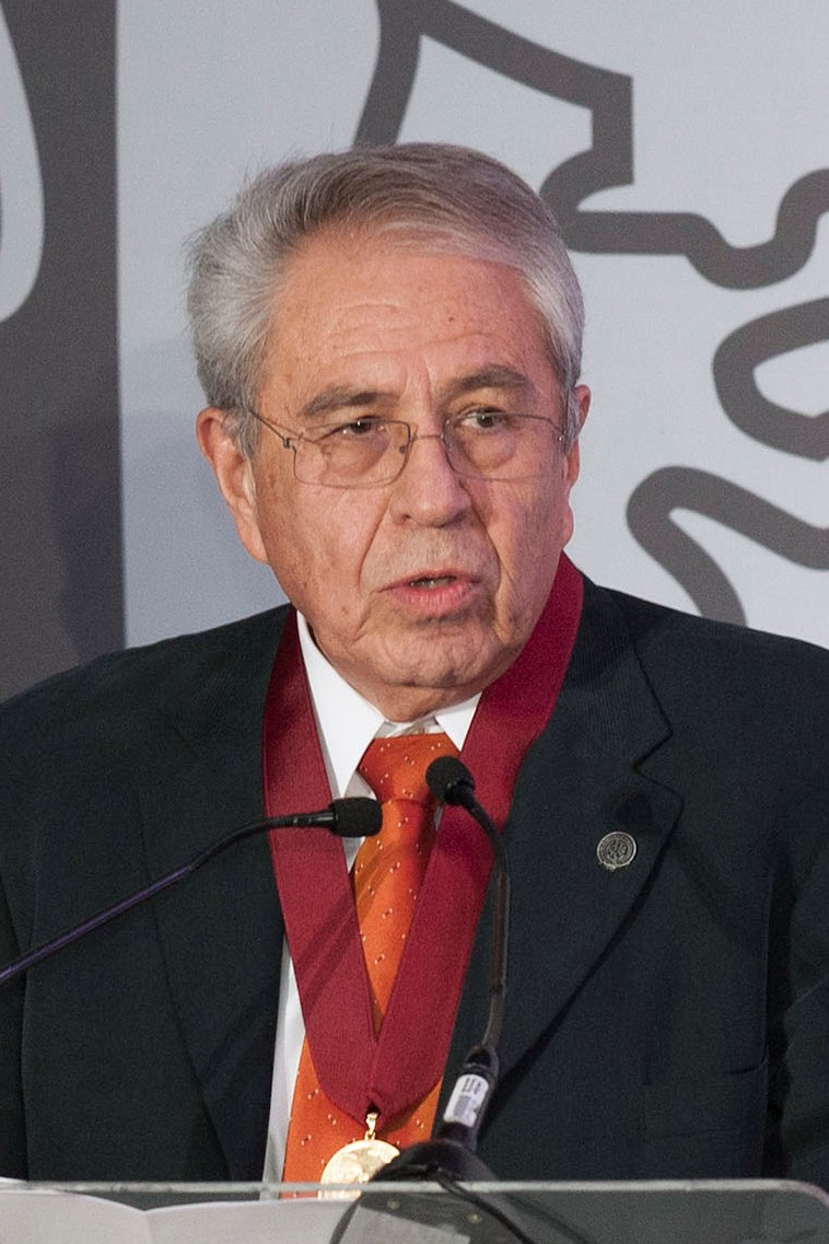 Doctor Jorge Carlos Alcocer Varela el 24 de noviembre de 2014, recibiendo el Premio Heberto Castillo de la Secretaria de Ciencia, Tecnologia e Invacion de la Ciudad de Mexico.